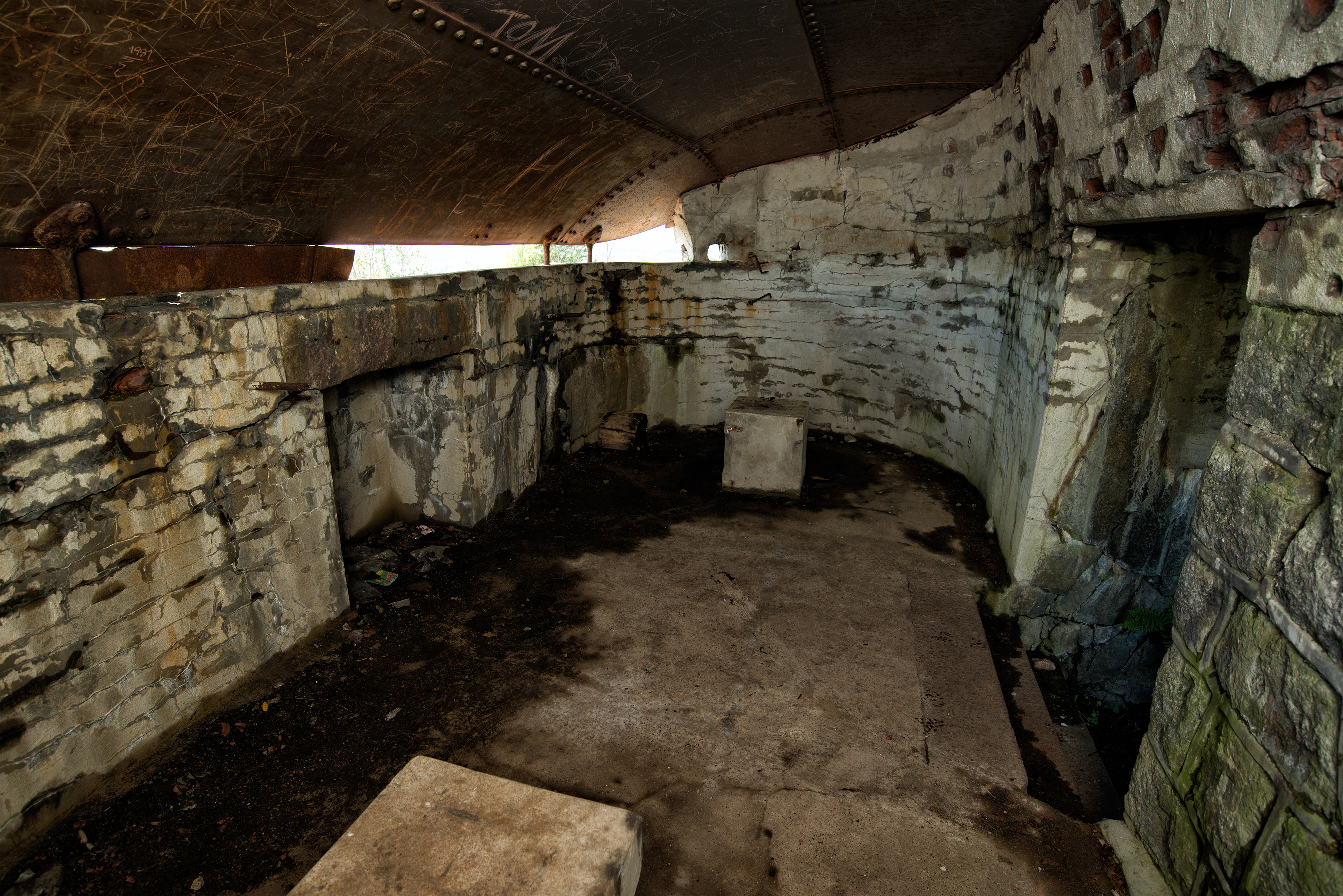 Håøya fort i Tønsbergfjorden